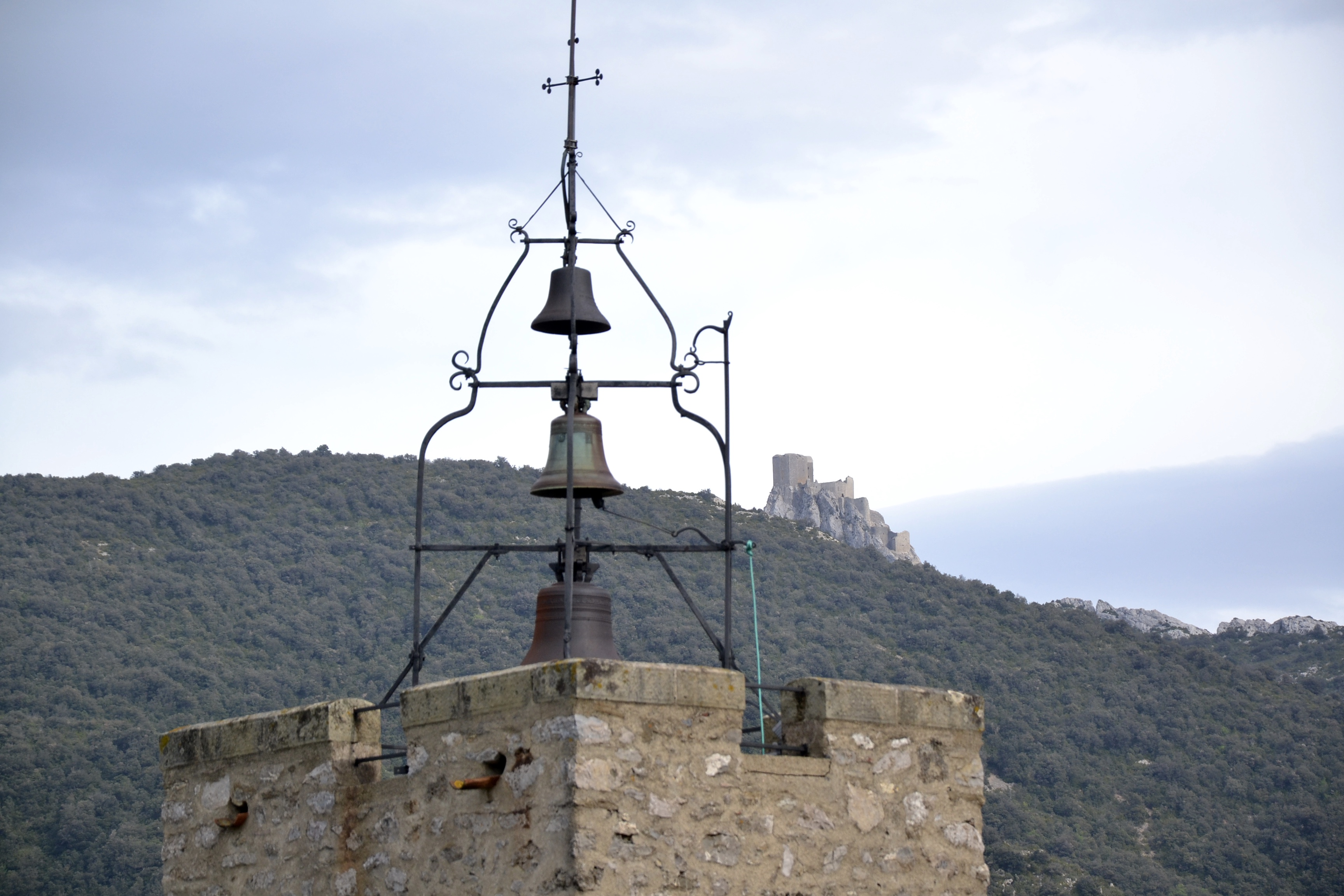 Le château de Quéribus, derrière le clocher de l'église de Cucugnan (Aude, France).